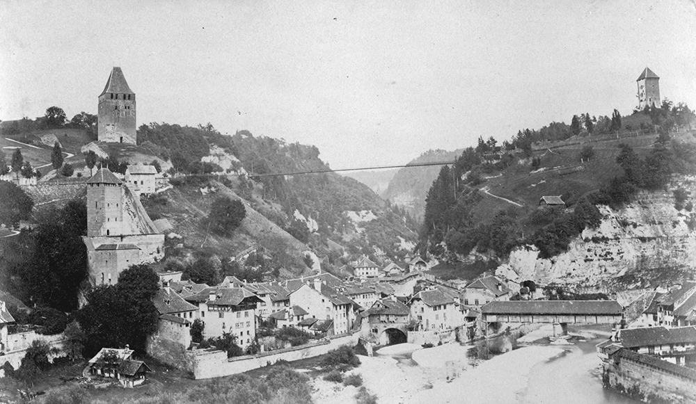 Pont du Gottéron au XIXème siècle